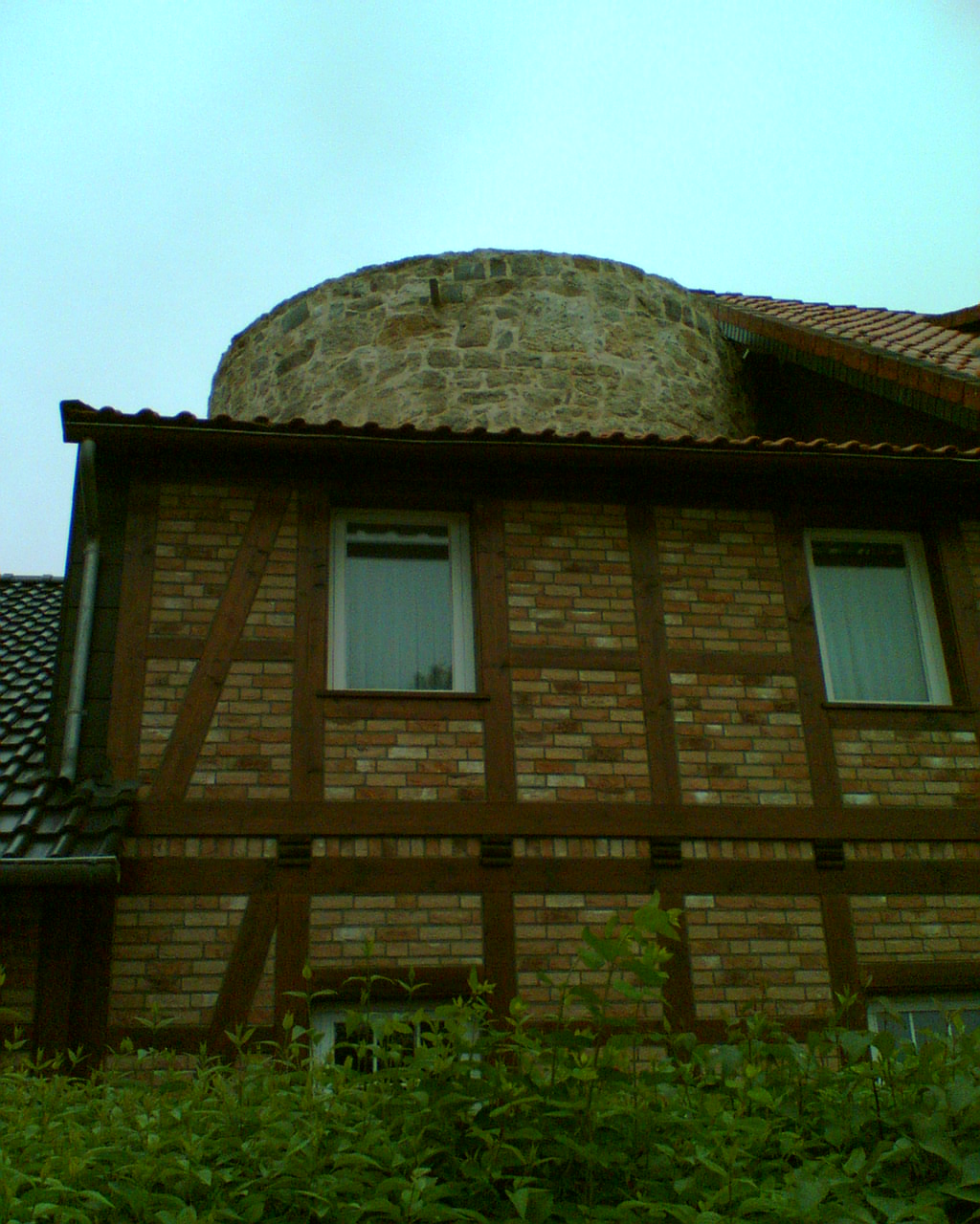 Der Klapperturm an der Strasse zwischen der Stadt Einbeck und der Stadt Dassel.